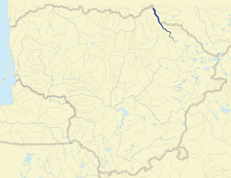 River Nemunėlis